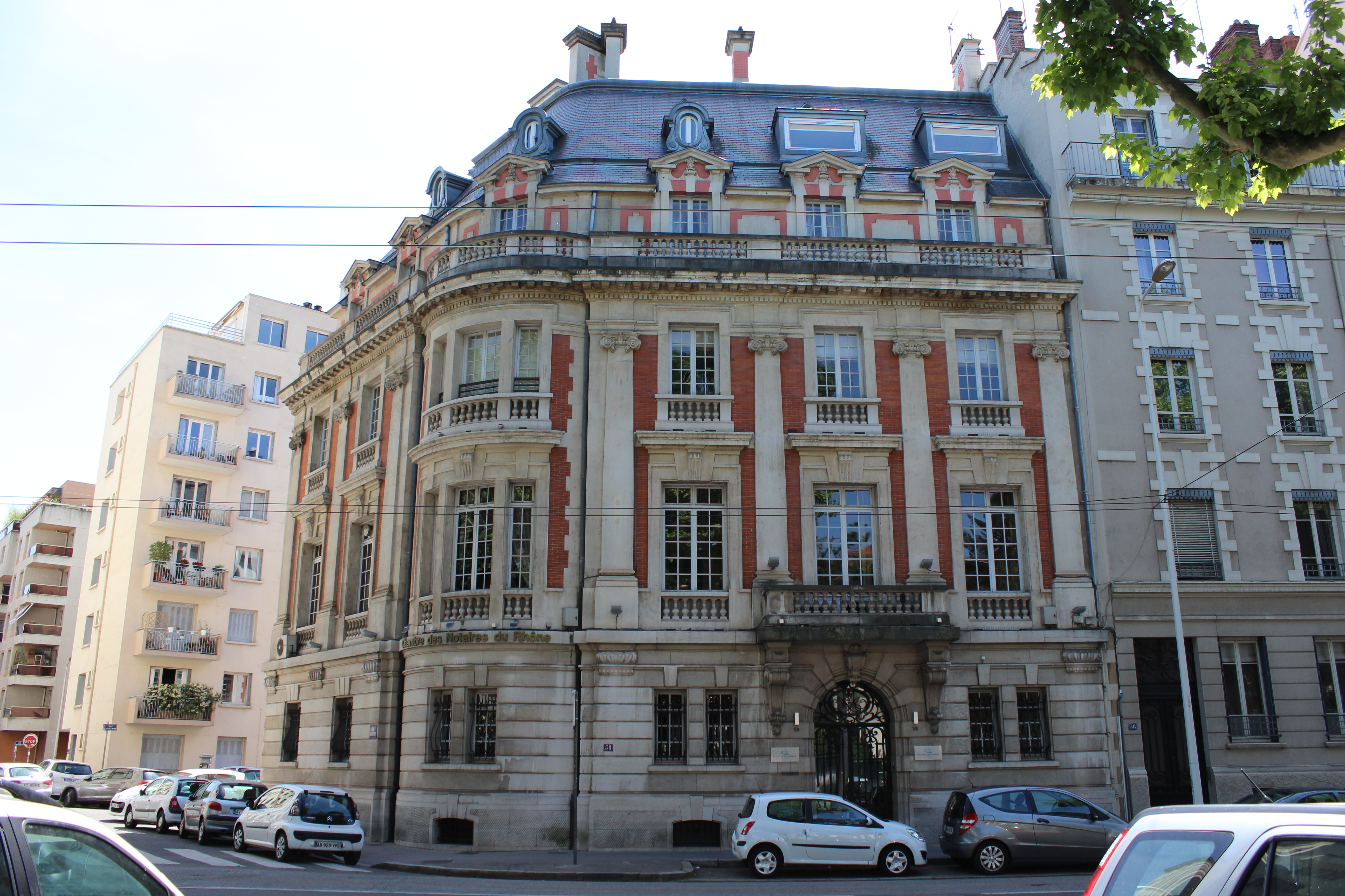 Chambre des notaires.